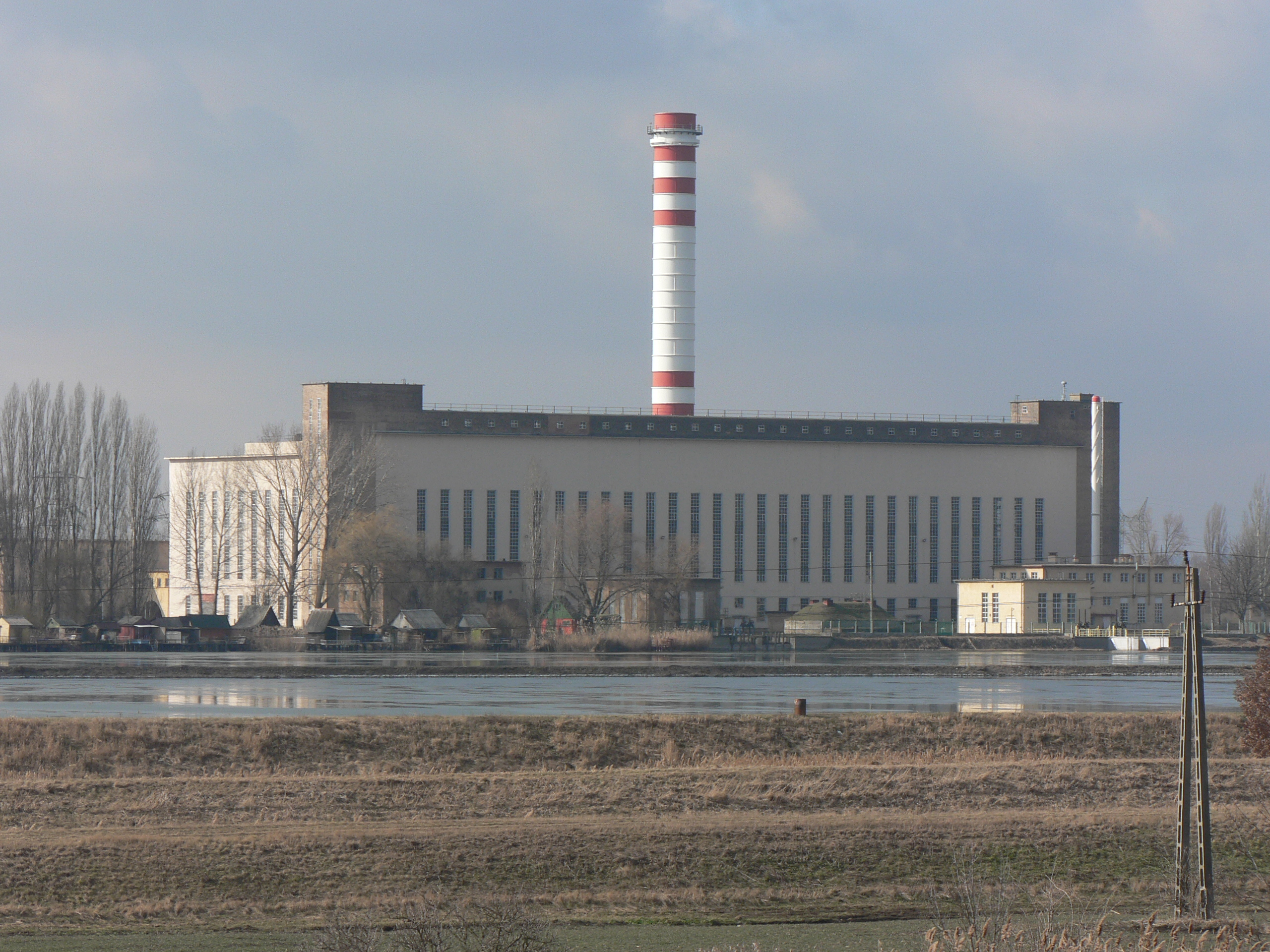 A Mátravidéki Erőmű a hűtőtó felől